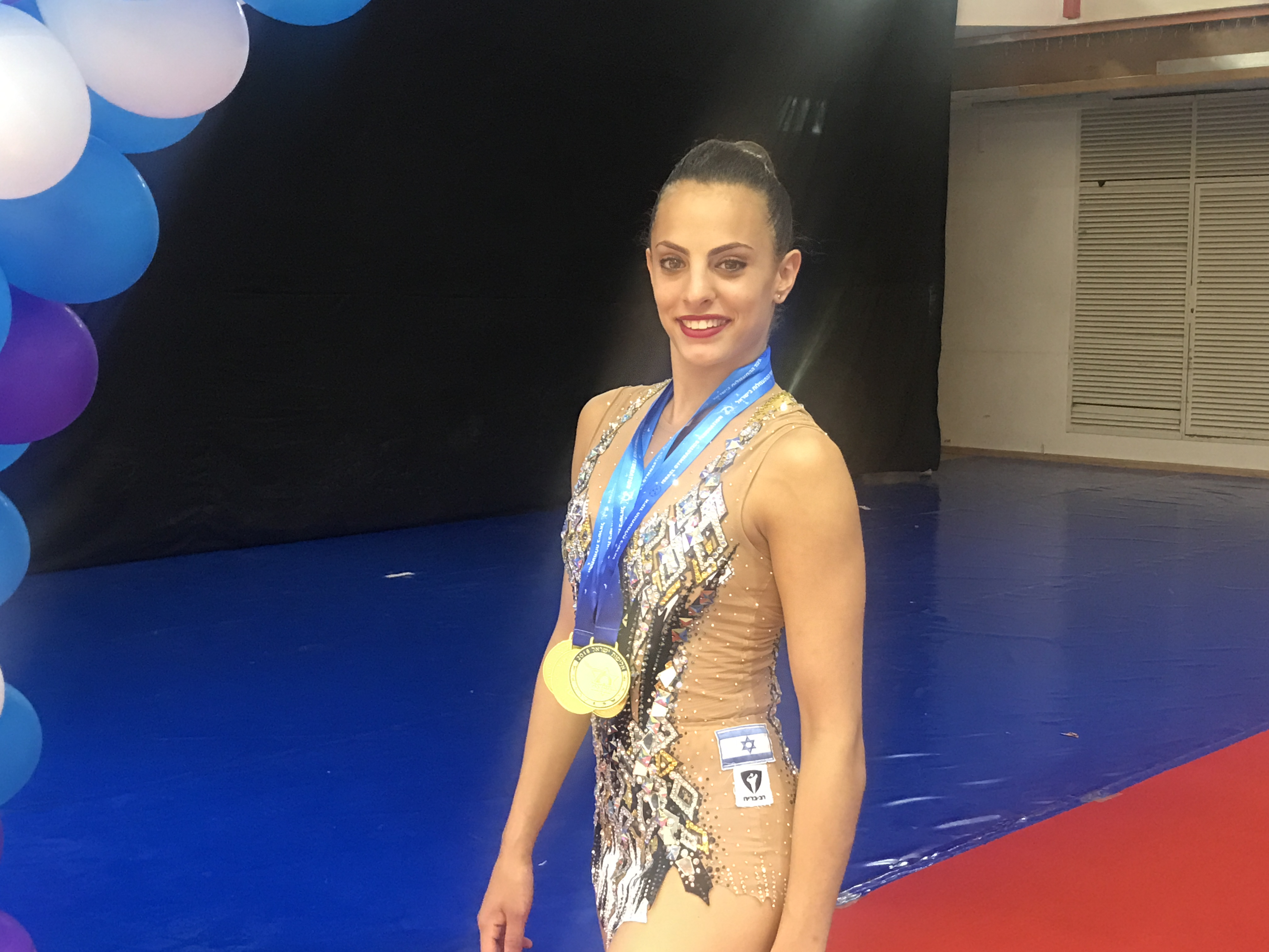 אליפות ישראל 2018